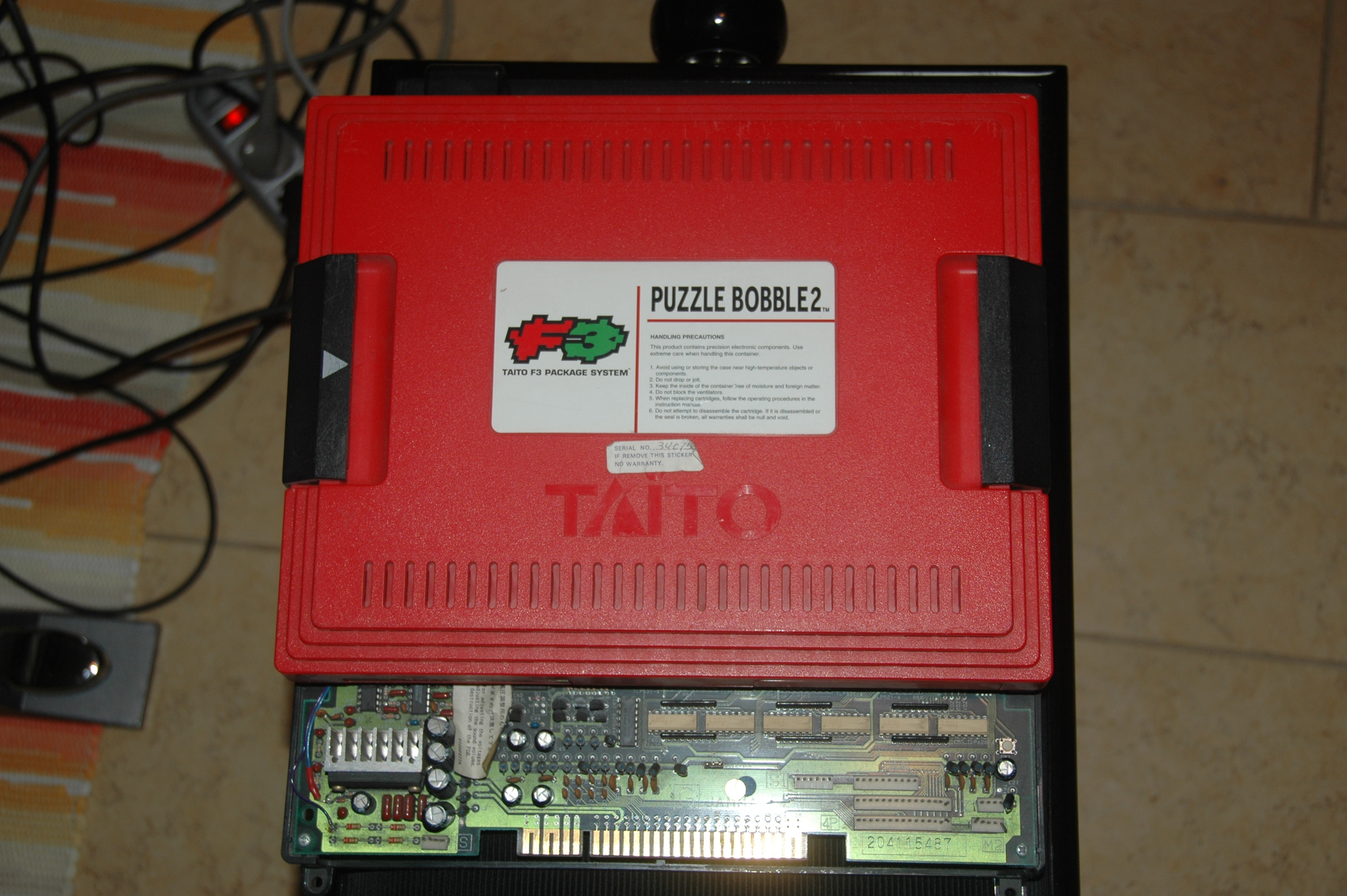 La mortherboard di Puzzle Bobble 2 originale Taito con installata la daughter board con le roms